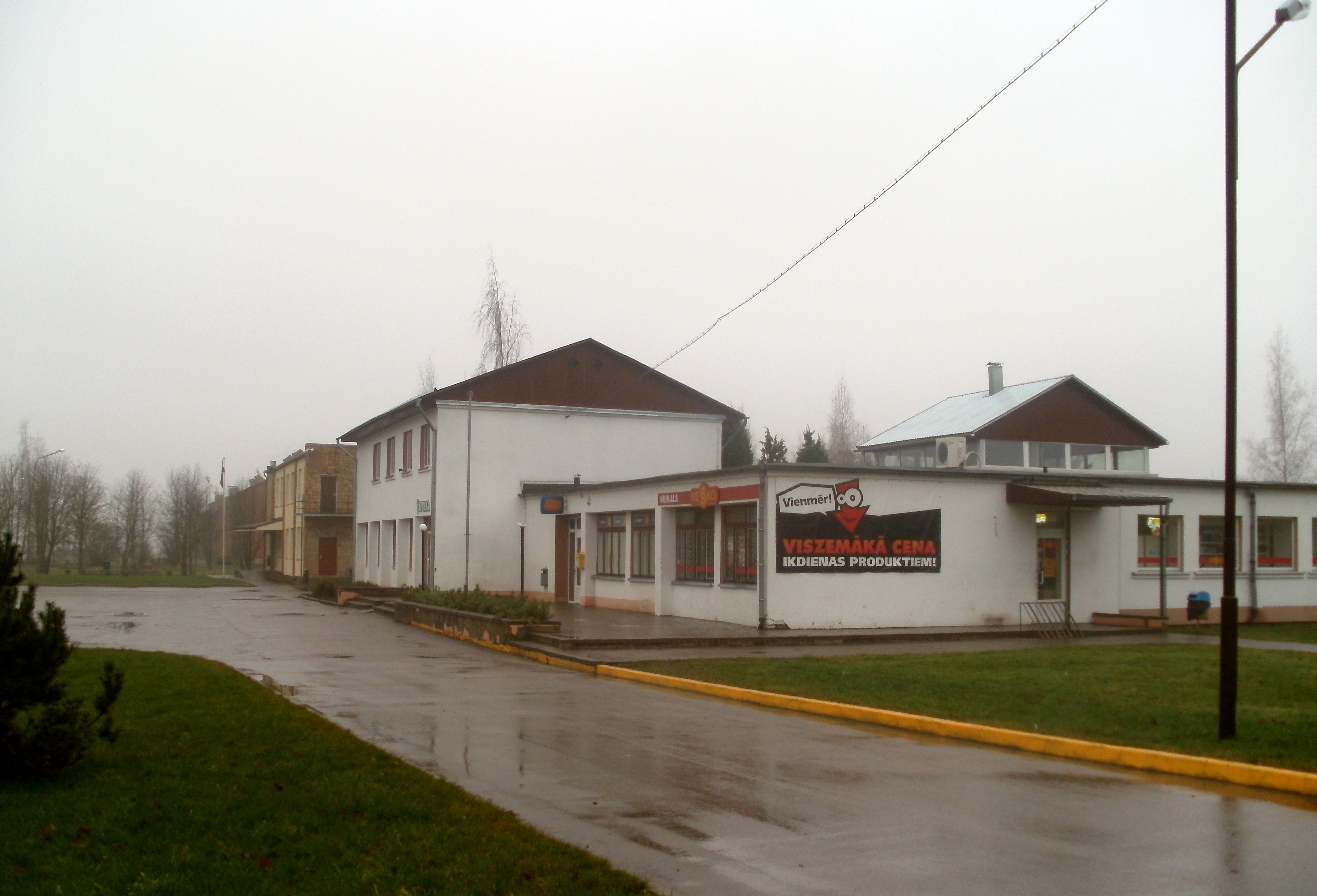 Sesavas ciema centrs rudenī